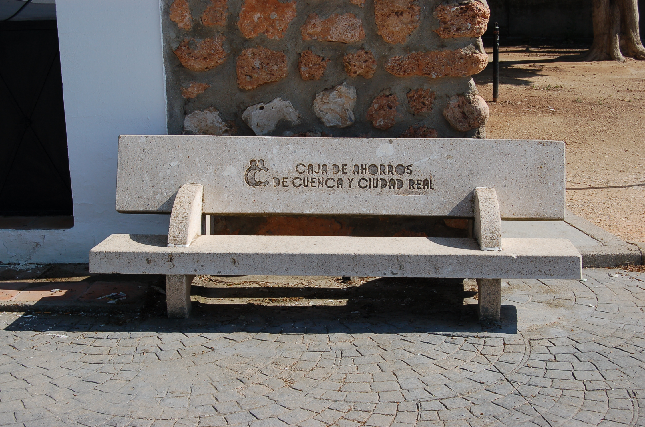 Banco da Caja de Ahorros de Cuenca y Ciudad Real en Horcajo de Santiago